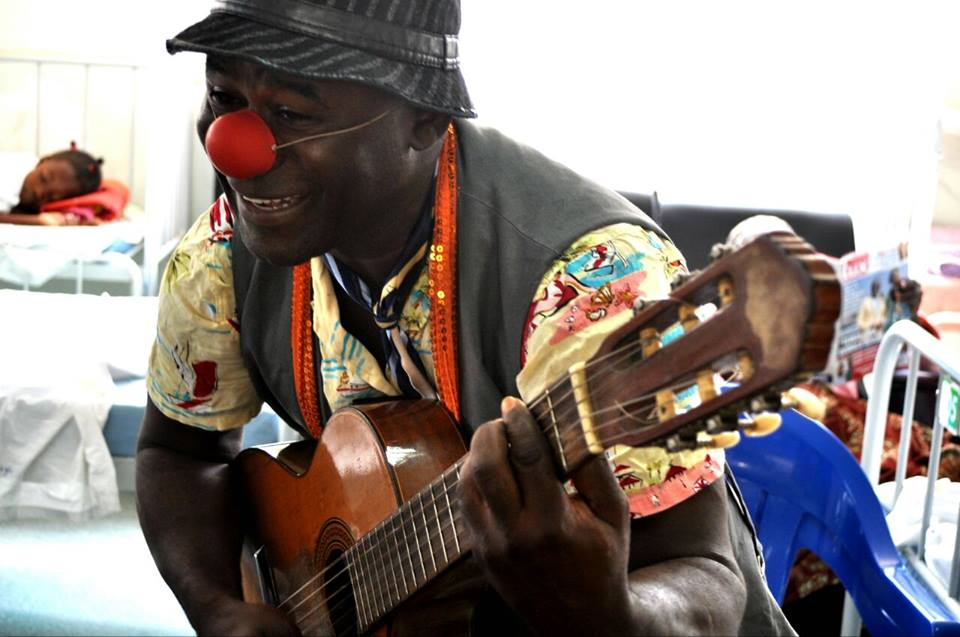 Jeremias caracol, projecto medicos palhaços..